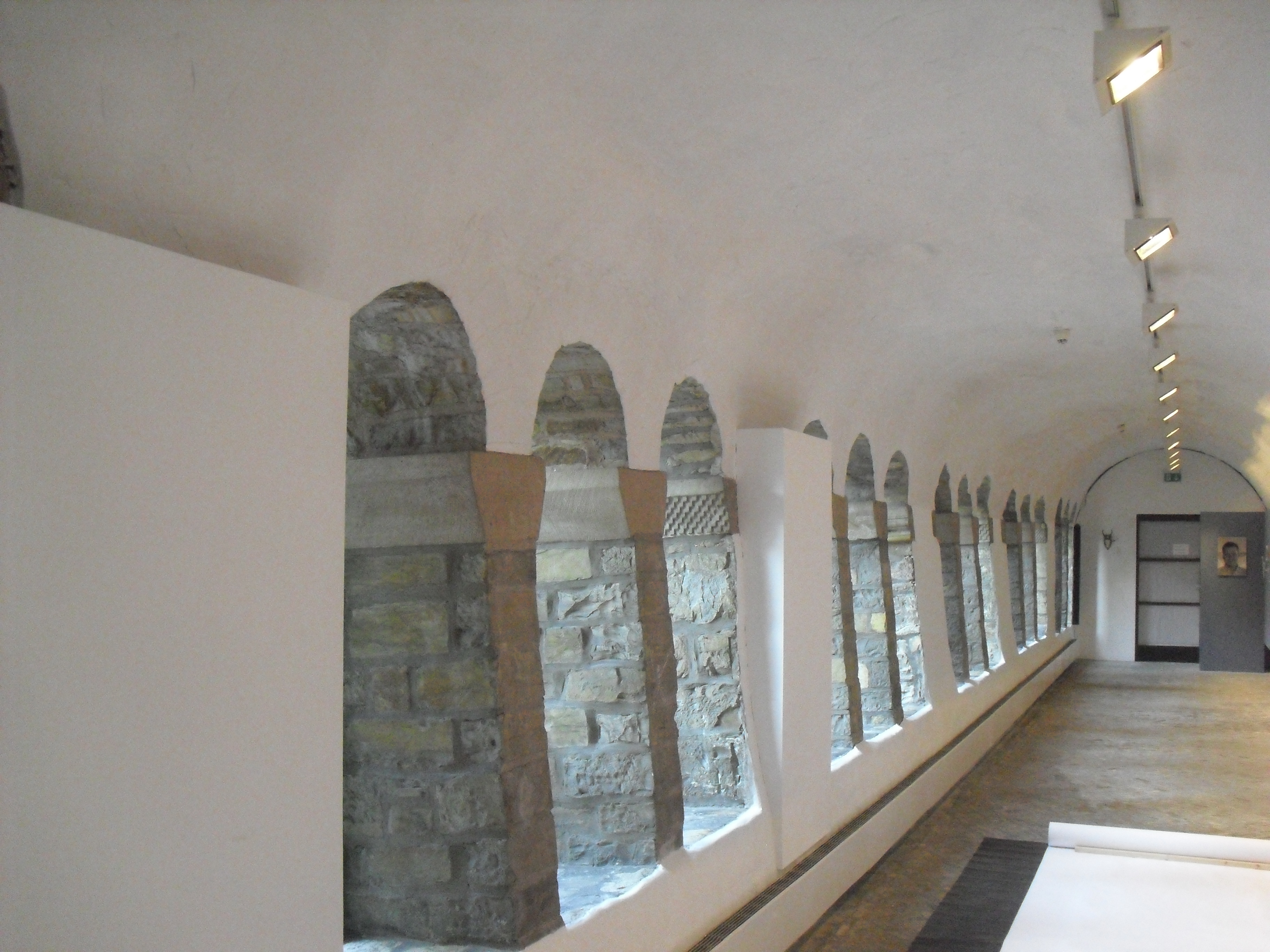 Reste des Kreuzgangs des Abdinghofklosters in der Galerie Am Abdinghof